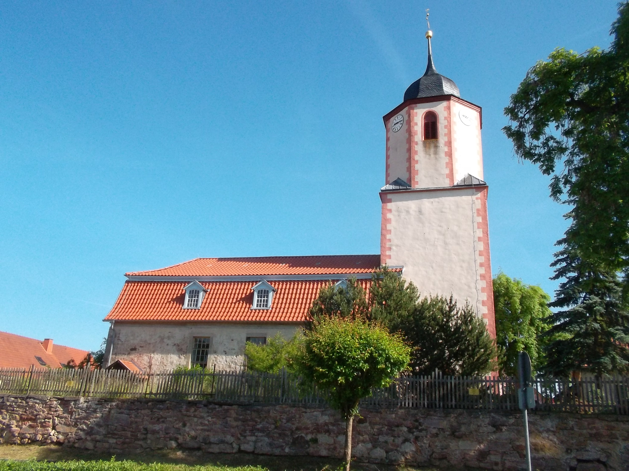 2014 in Hermannsfeld